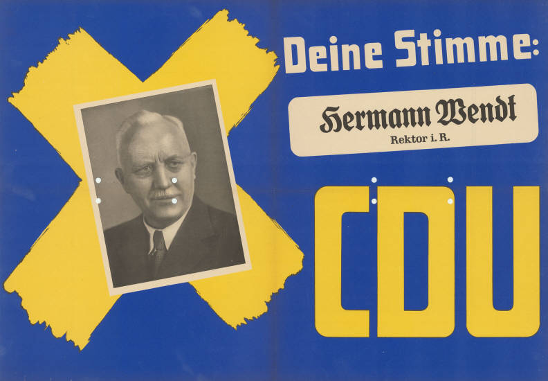 Deine Stimme: Hermann Wendt Rektor i. R. CDU Abbildung: Porträtfoto - Stimmkreuz Plakatart: Kandidaten-/Personenplakat mit Porträt Objekt-Signatur: 10-009 : 194 Bestand: Landtagswahlplakate Nordrhein-Westfalen (10-009) GliederungBestand10-18: Landtagswahlplakate Nordrhein-Westfalen (10-009) » Landtagswahl am 18.6.1950 » CDU » mit Porträtfoto Lizenz: KAS/ACDP 10-009 : 194 CC-BY-SA 3.0 DE